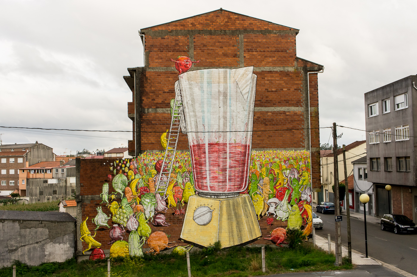 Blu Desordes